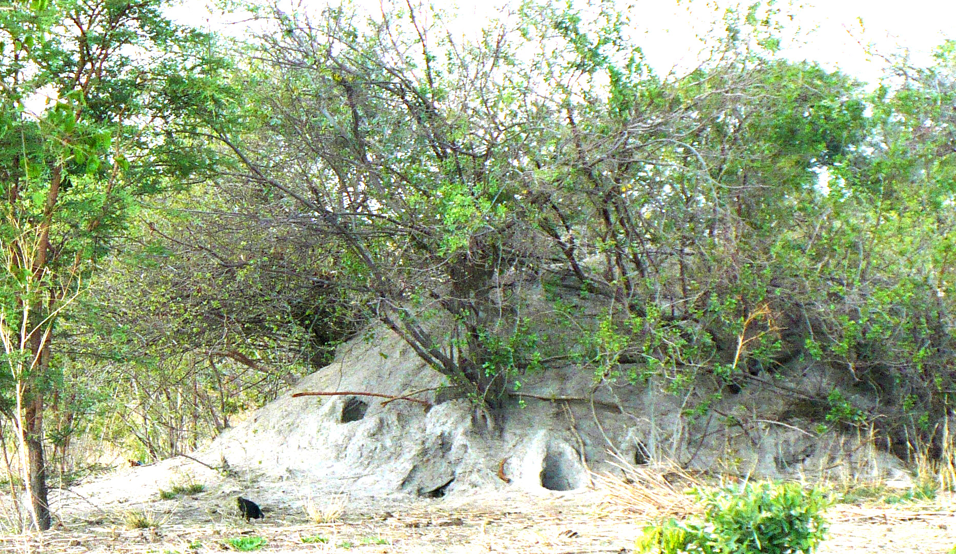 Termitière en Zambie